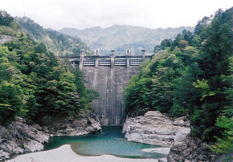 Dam